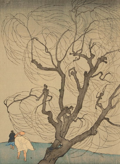 Графічний твір з використанням стилістики японської графіки роботи Еміля Орлика